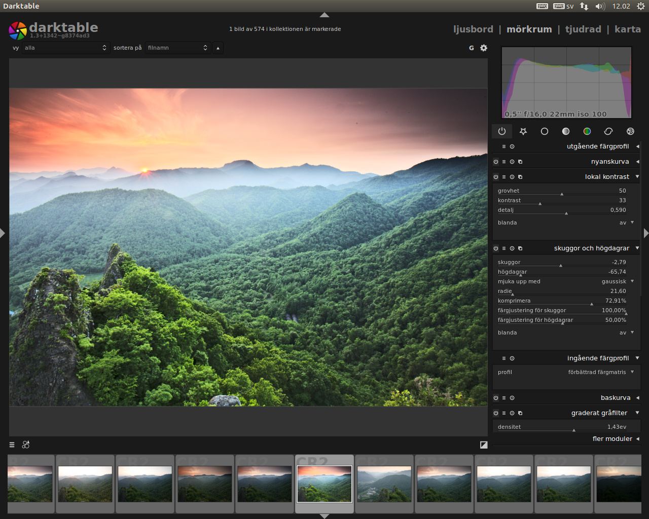 Råkonverteraren Darktable på svenska.